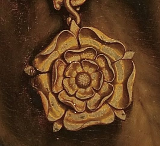 İngiliz devlet adamı, yazar ve hukukçu Thomas More'un (1478-1535); Alman ressam Hans Holbein tarafından 1527 yılında, 74,2 cm x 59 cm (29,2 in x 23 in)